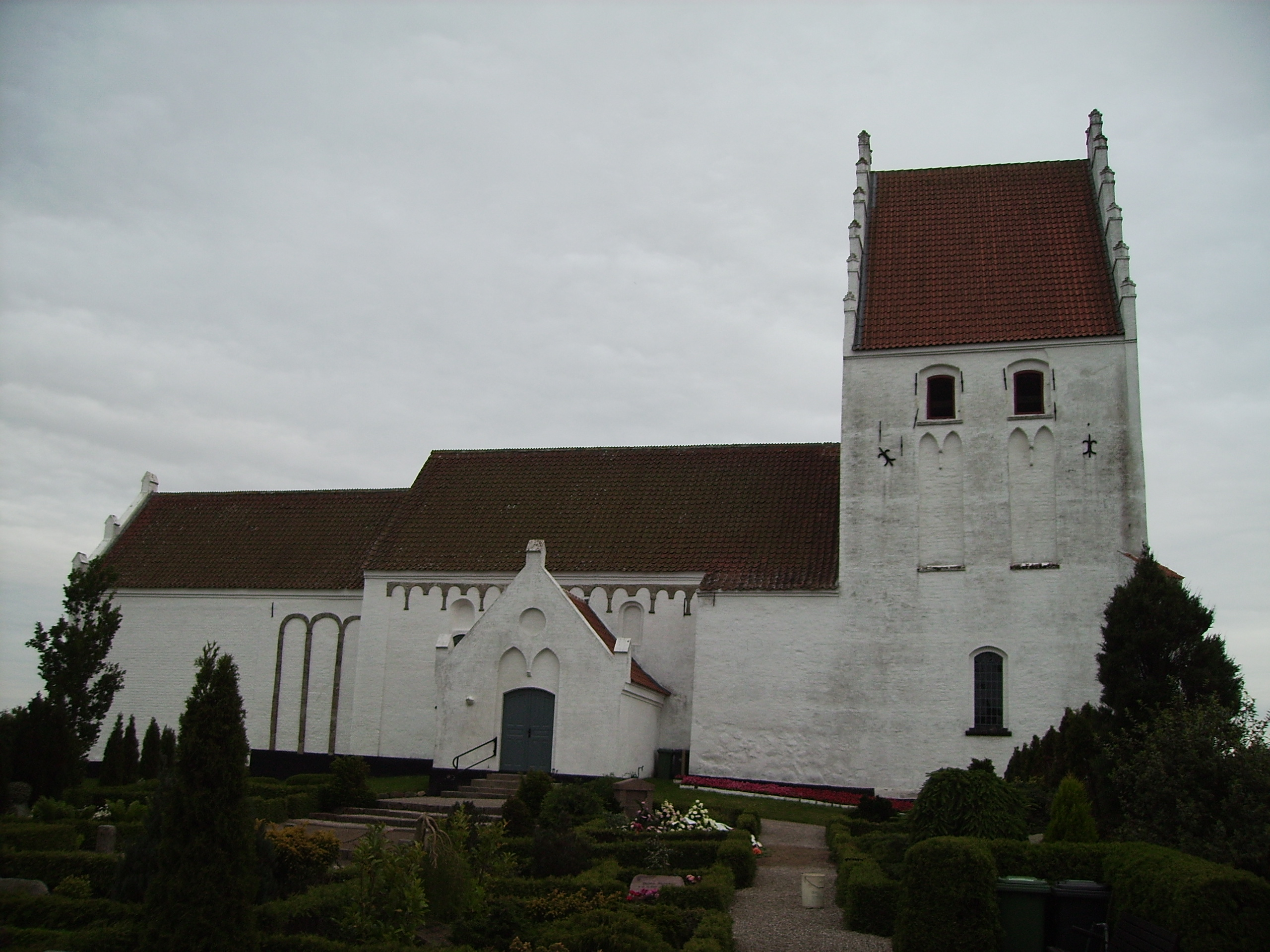 Kærum Kirke, Kærum Sogn, Båg Herred, Odense Amt, Denmark (Danish Church) - Kærum Kirke fra nord